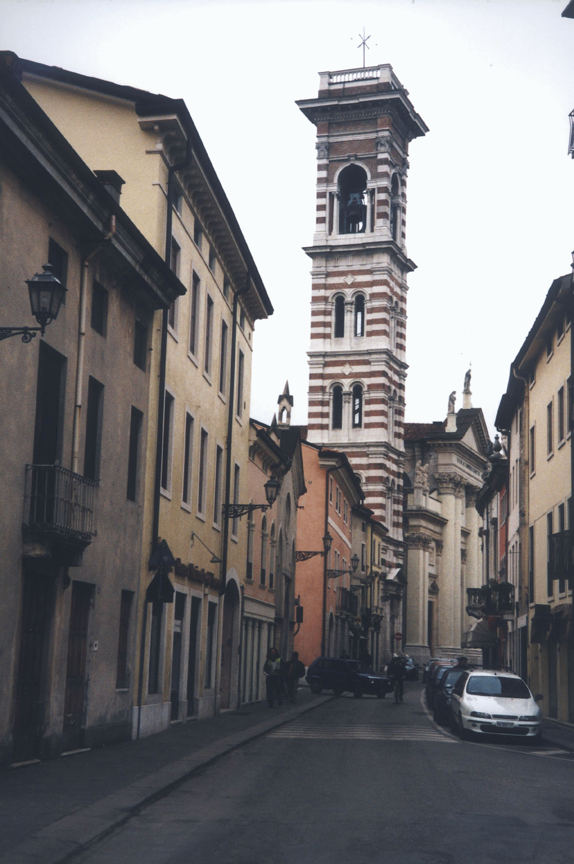 Arzignano (VI)